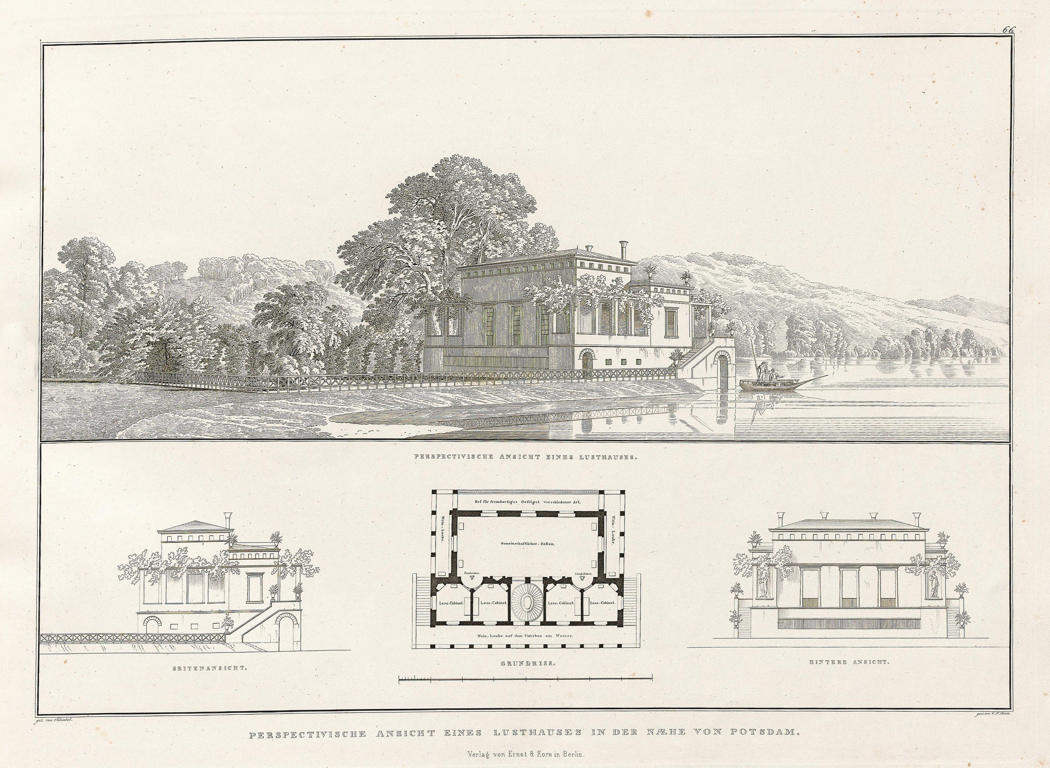 Lusthaus an der Havel, Entwurf von Karl Friedrich Schinkel